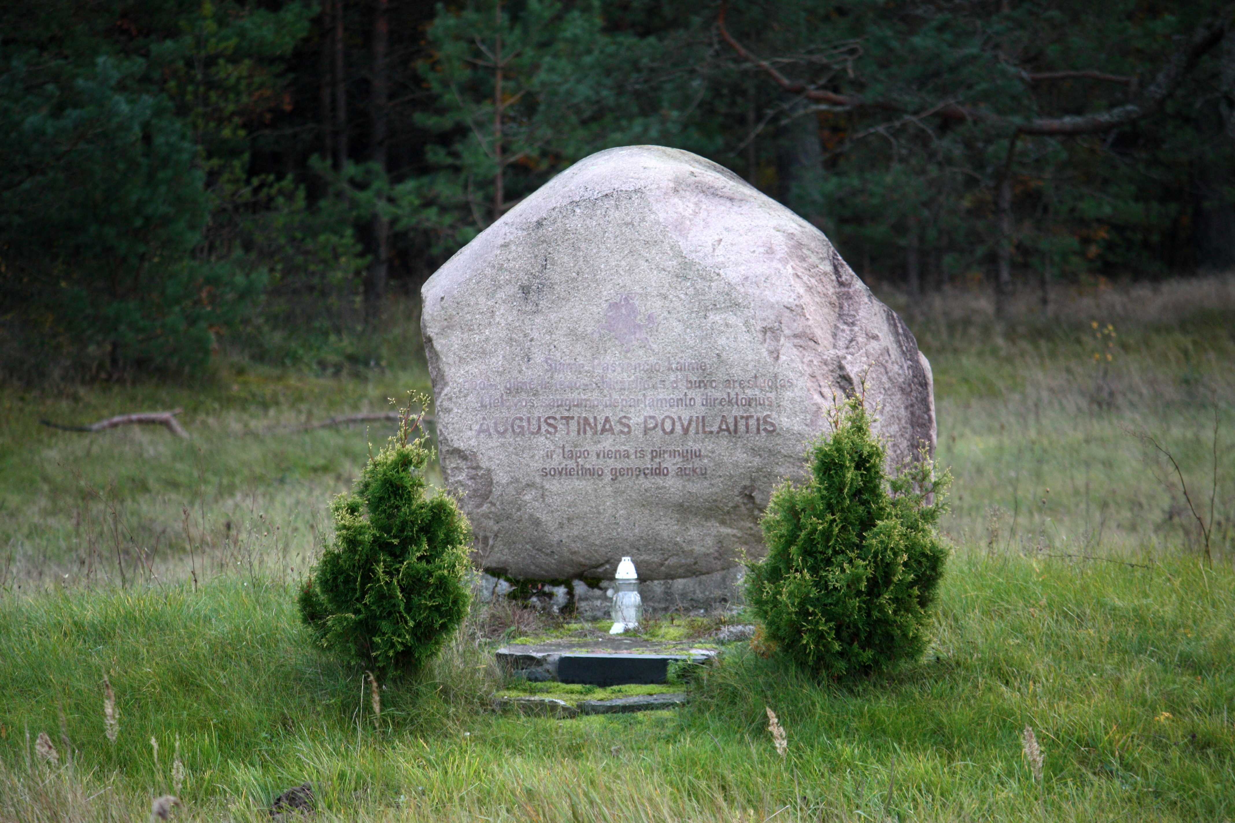 Paminklas Augustinui Povilaičiui Pašventyje. G. Kulikausko fotografija.